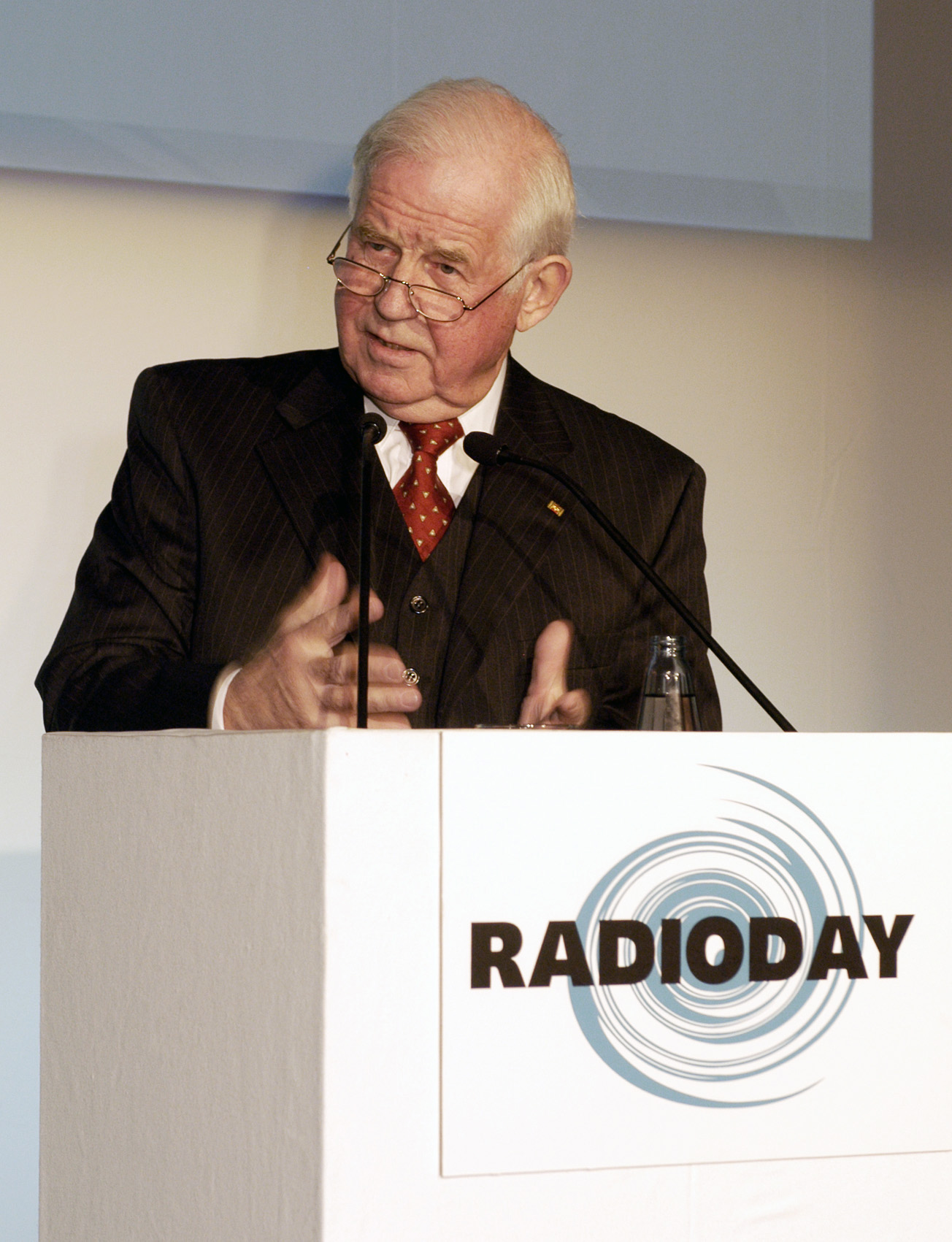 Kurt Biedenkopf auf dem Radioday Kurt Steinhausen und Radioday